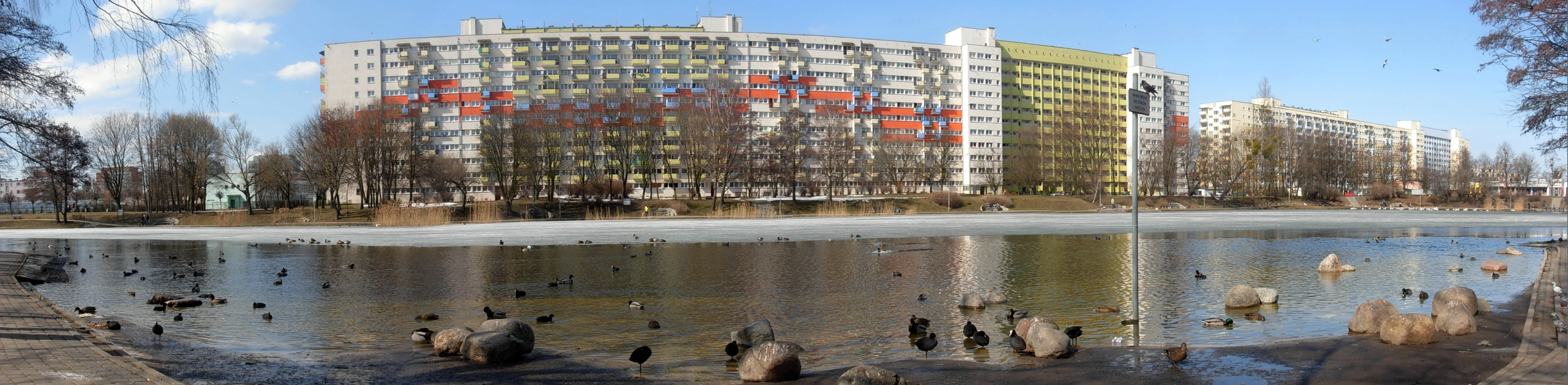 Park Balaton na osiedlu Bartodzieje w Bydgoszczy